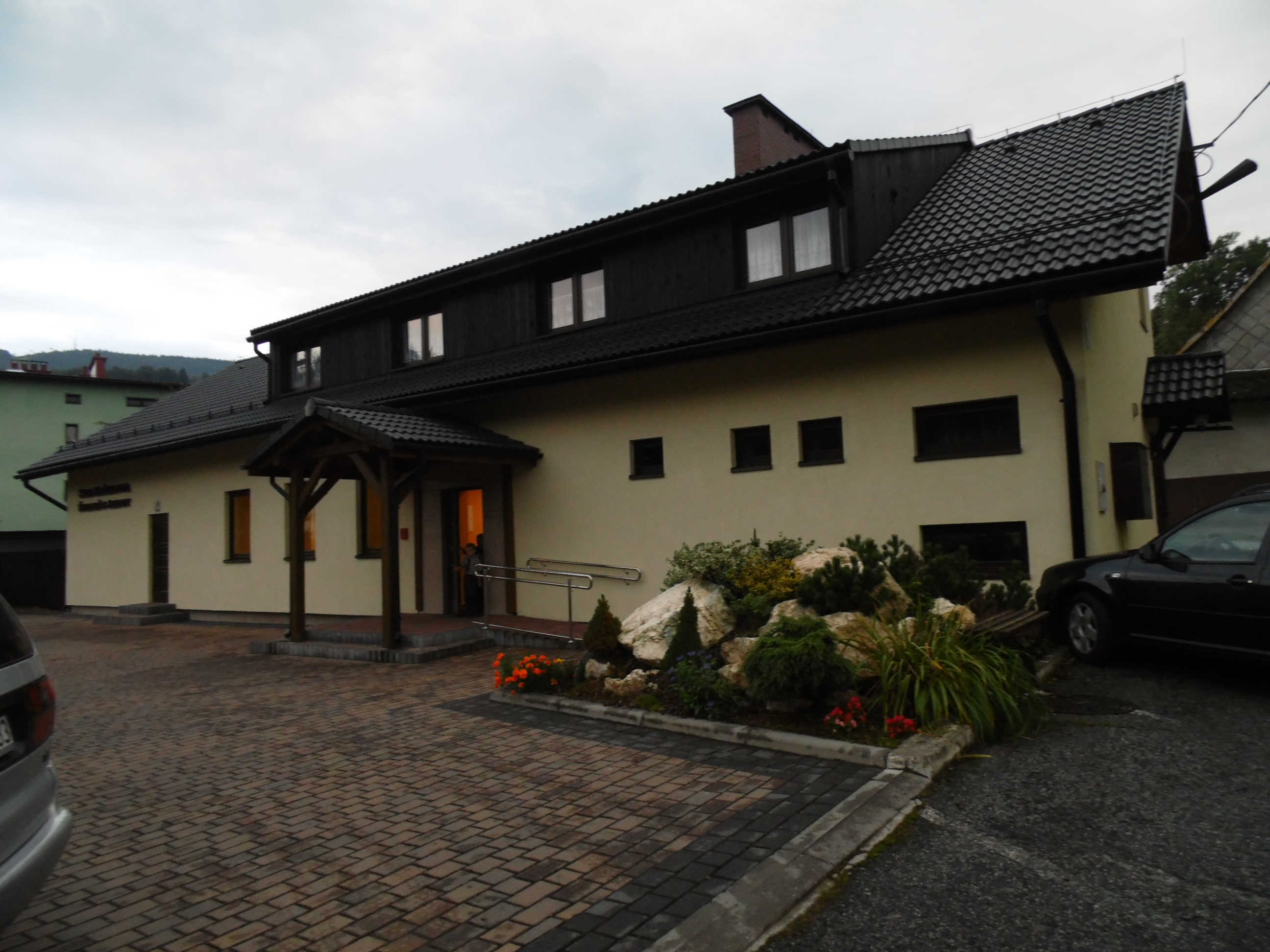 SALA KRÓLESTWA ŚWIADKÓW JEHOWY.